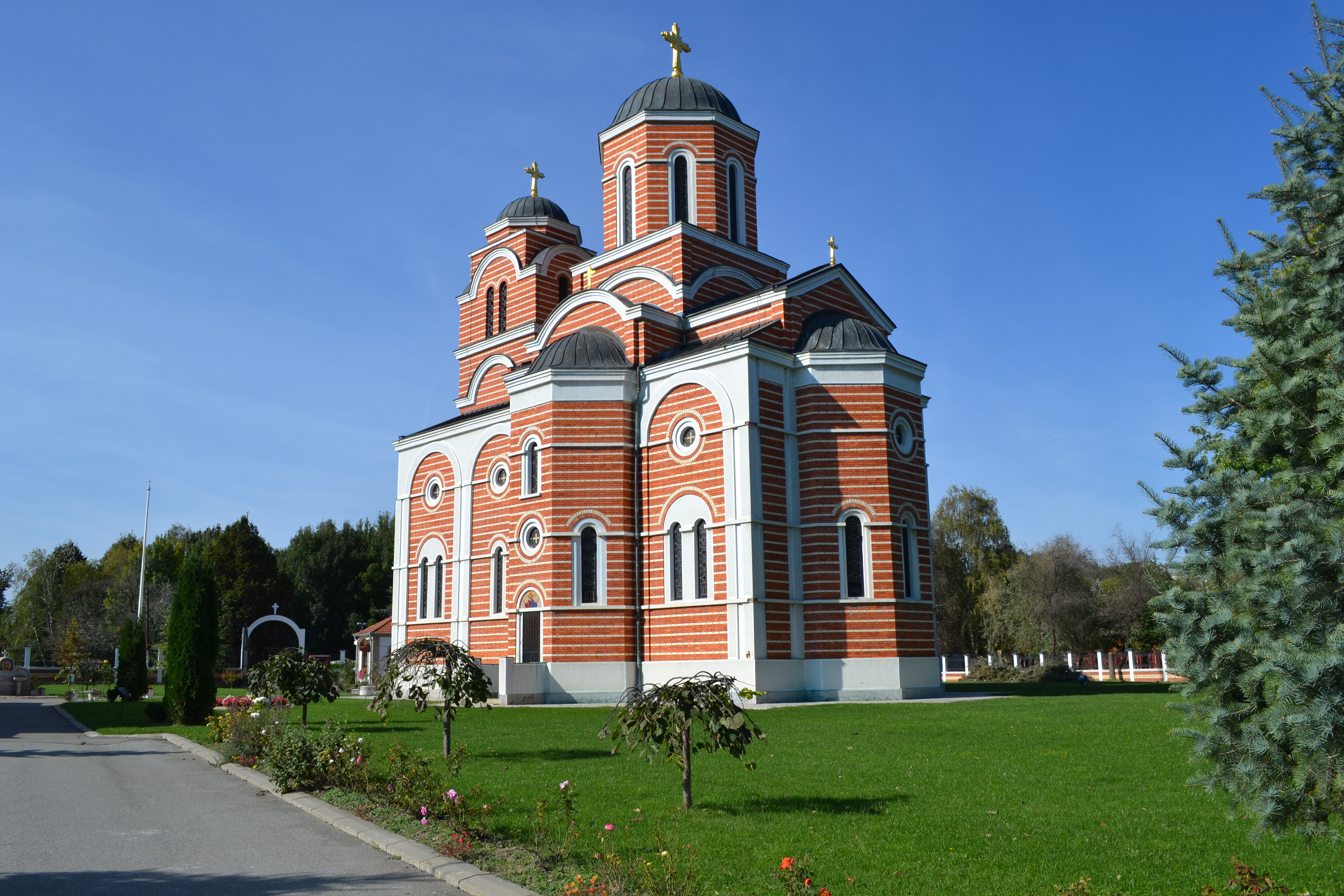 Newest and the most beautifull chirch in Batajnica, town near Belgrade, Serbia